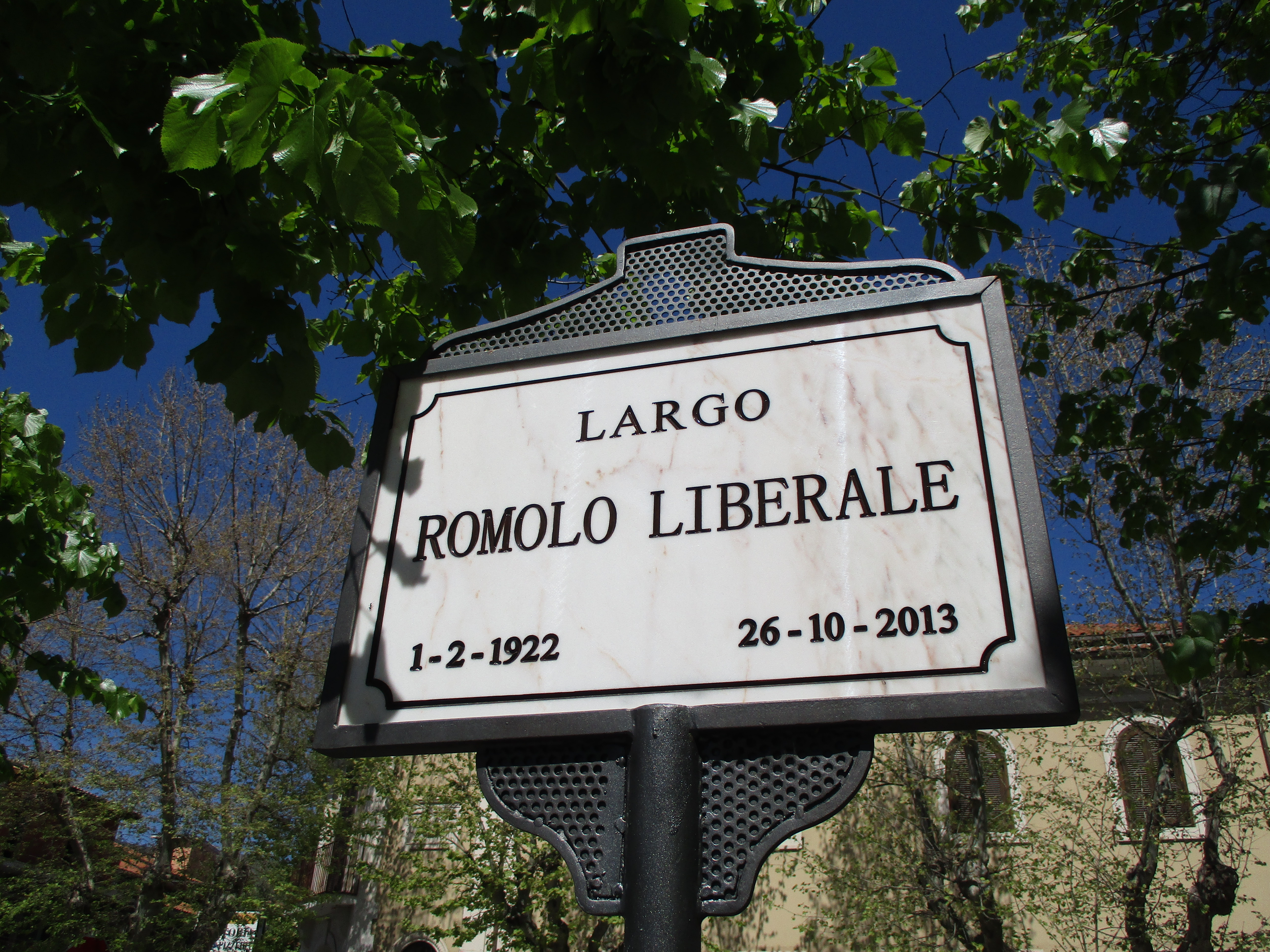 Targa di Largo Romolo Liberale